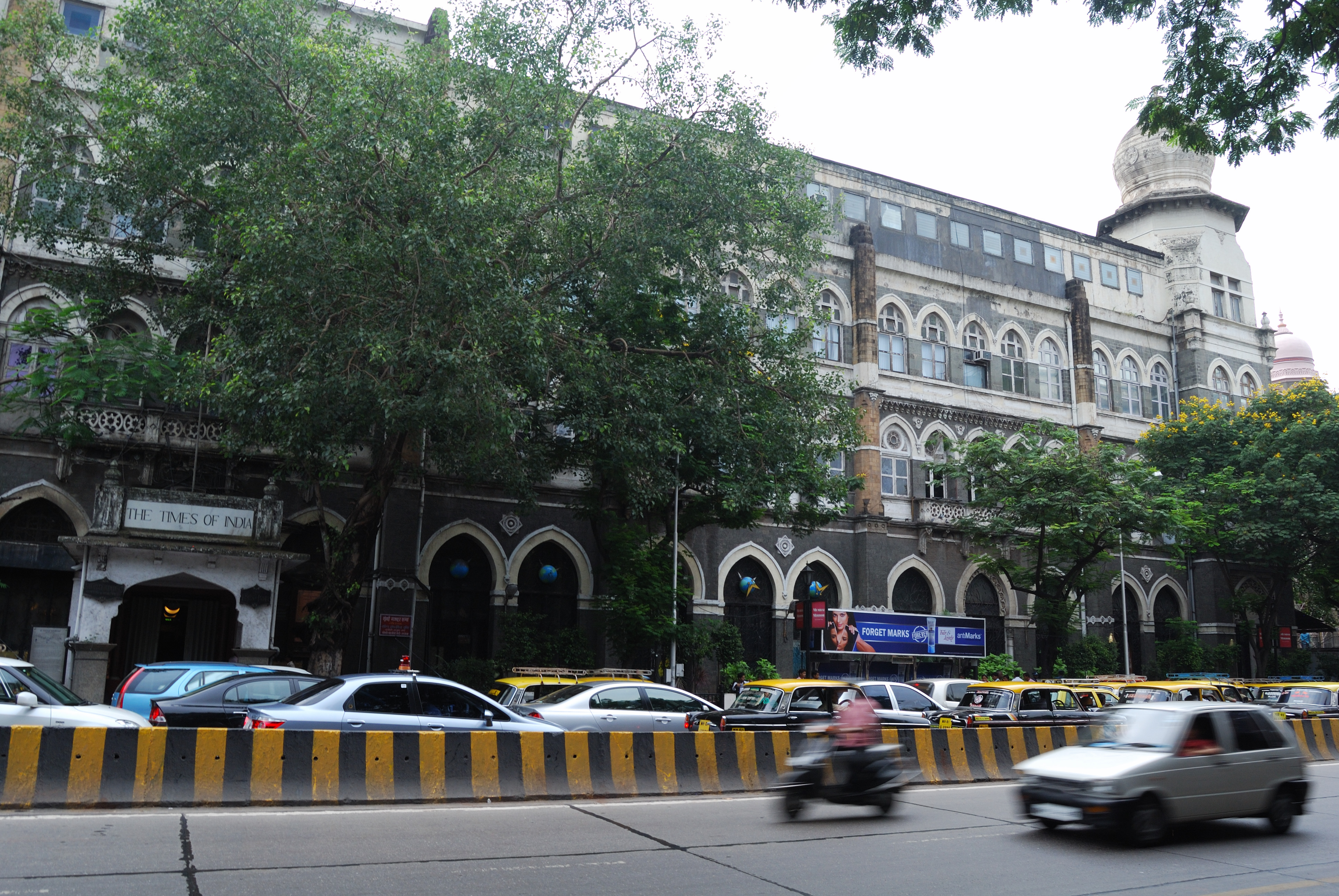 TOI Building, Mumbai